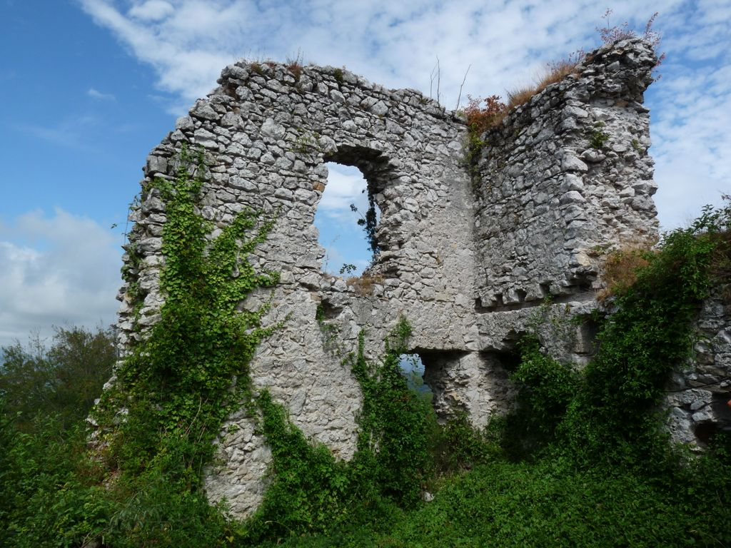 Zbelovski grad